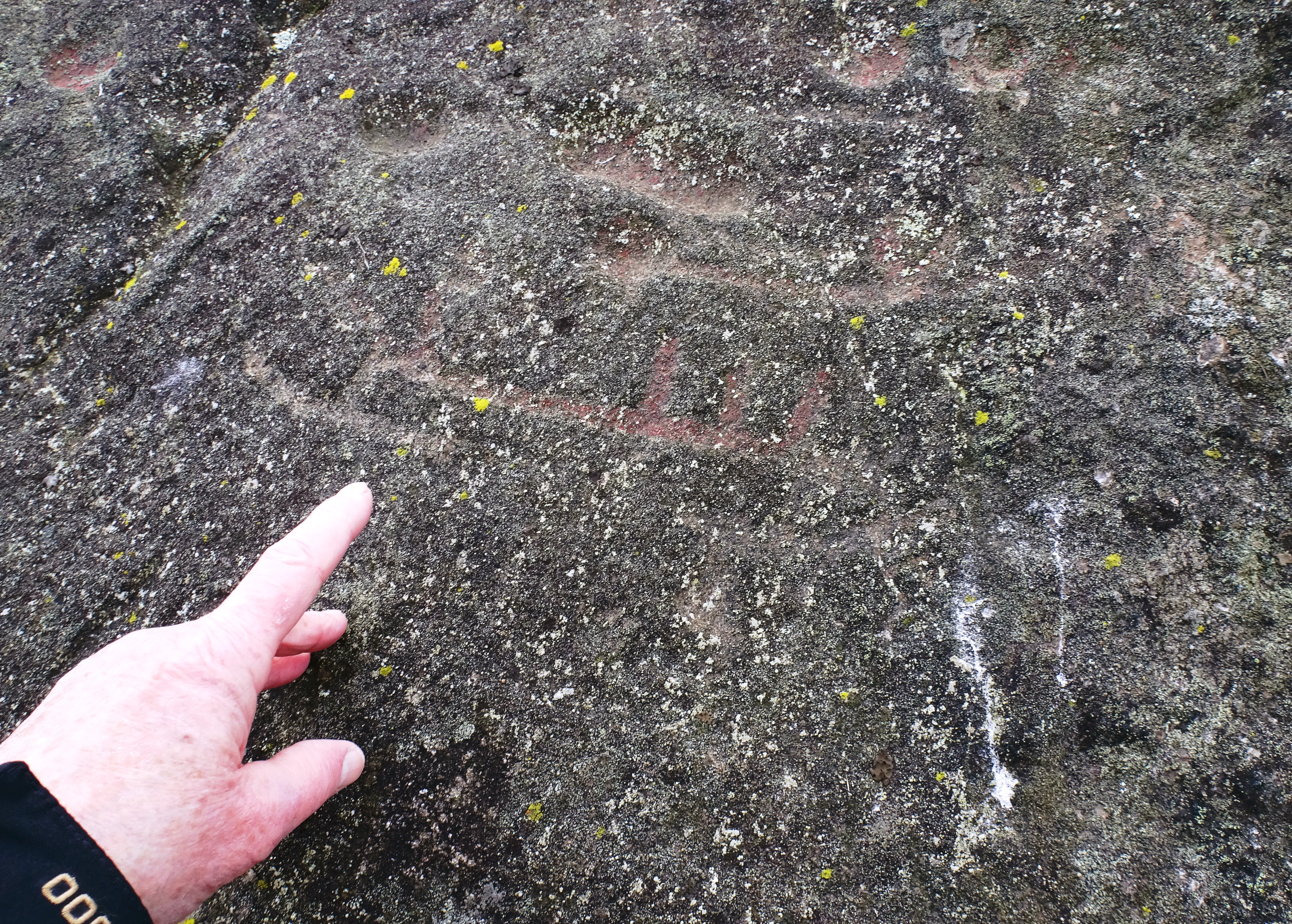 Hallingeristningen